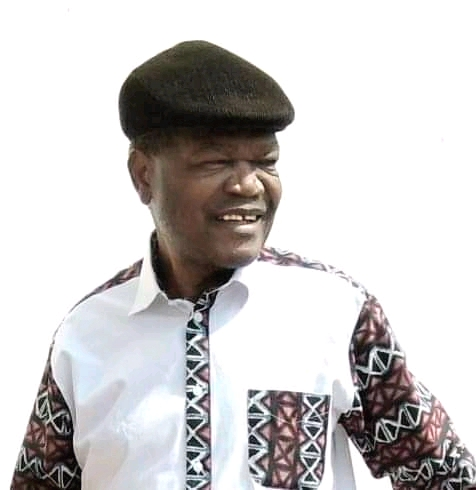 Valentin Nga Ndongo, sociologue, enseignant-chercheur camerounais, à la sortie d'un amphithéâtre à l’université de Yaoundé I.